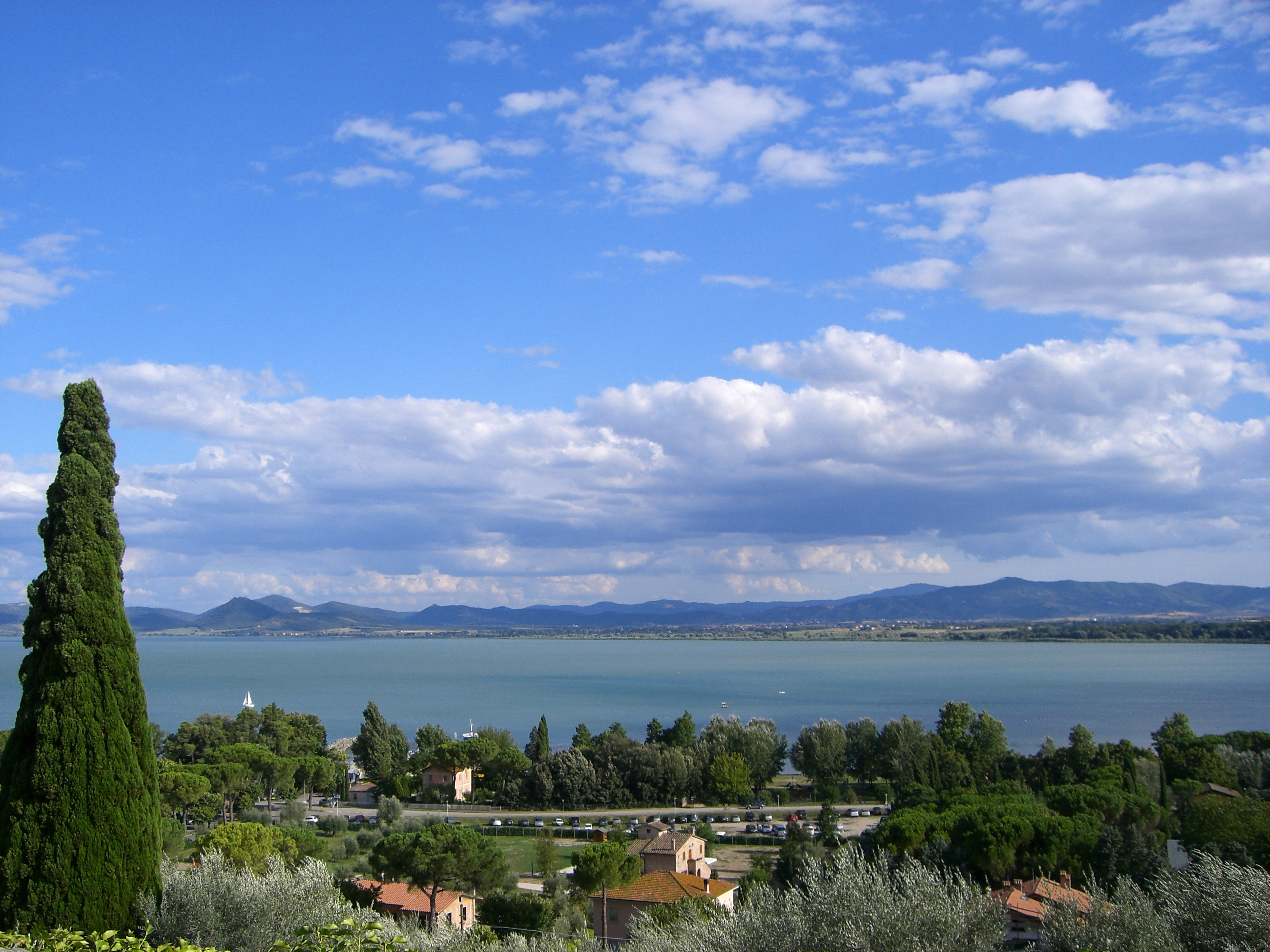 Lago Trasimeno